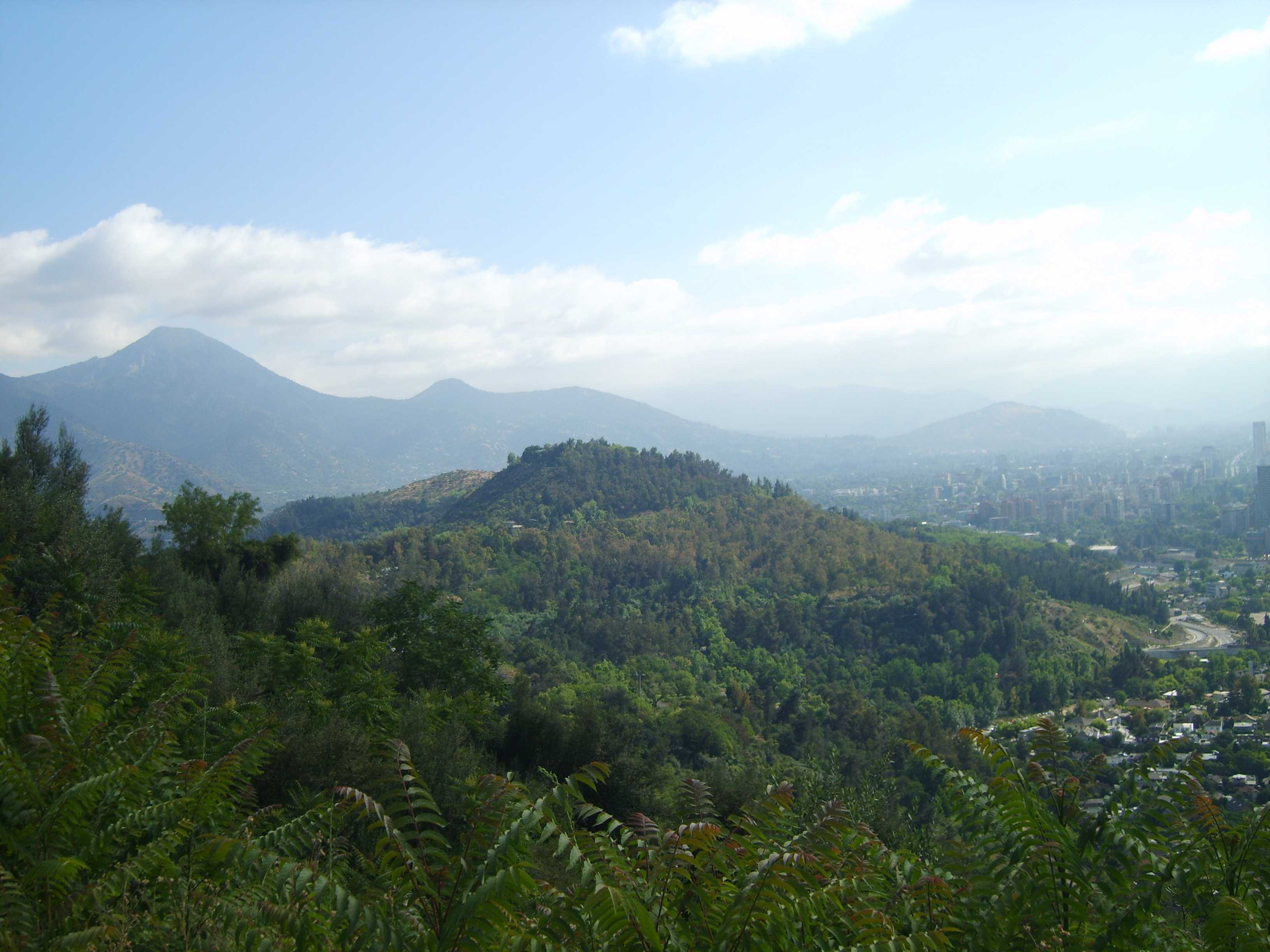 vista al cerro Tupahue desde el cerro San Cristóbal